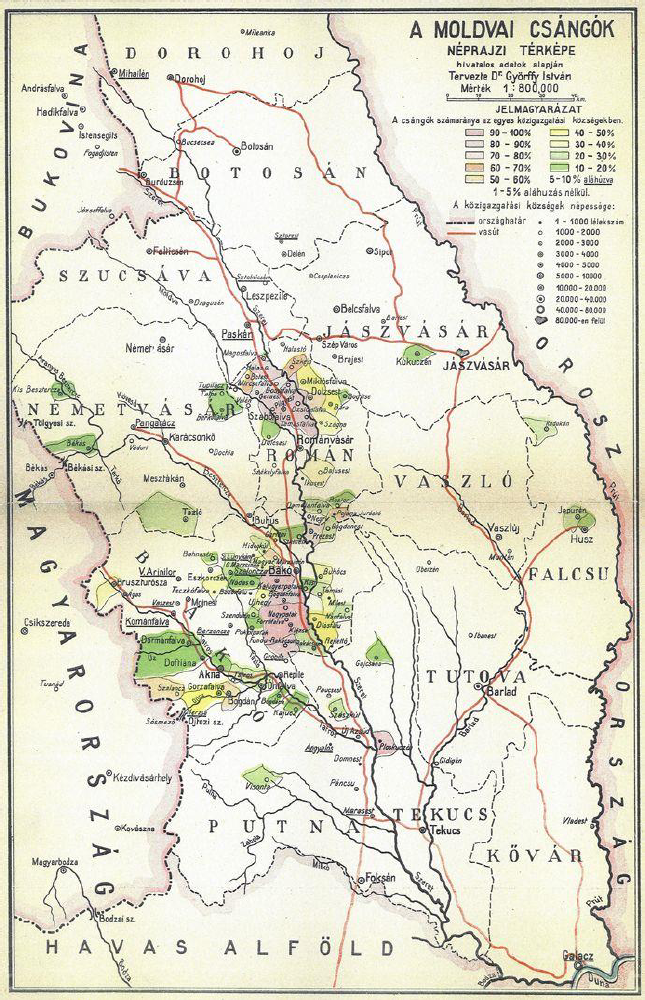 Repartiția ceangăilor în Moldova, după o hartă antebelică realizată de Györffy István.